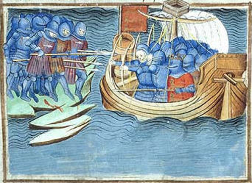 Bitva u Cadsandu 1337